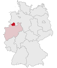 Kreis Steinfurt, North Rhine-Westphalia, Germany